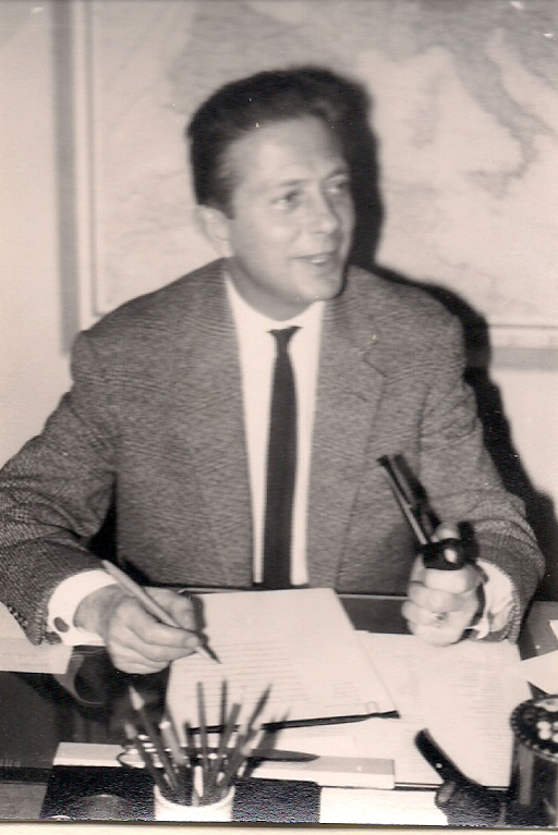 Hartwig von Mouillard, ehemaliger Chefredakteur der Tagesschau (ARD) mit Sitz in Hamburg